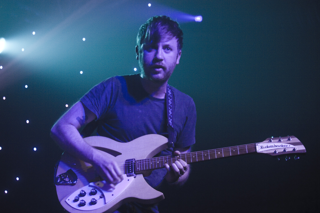 Foto: Rosario López